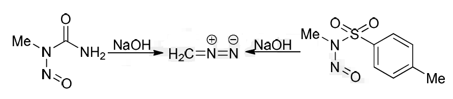 Generación de diazometano a partir de otros compuestos químicos